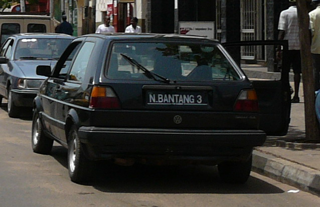 License plates